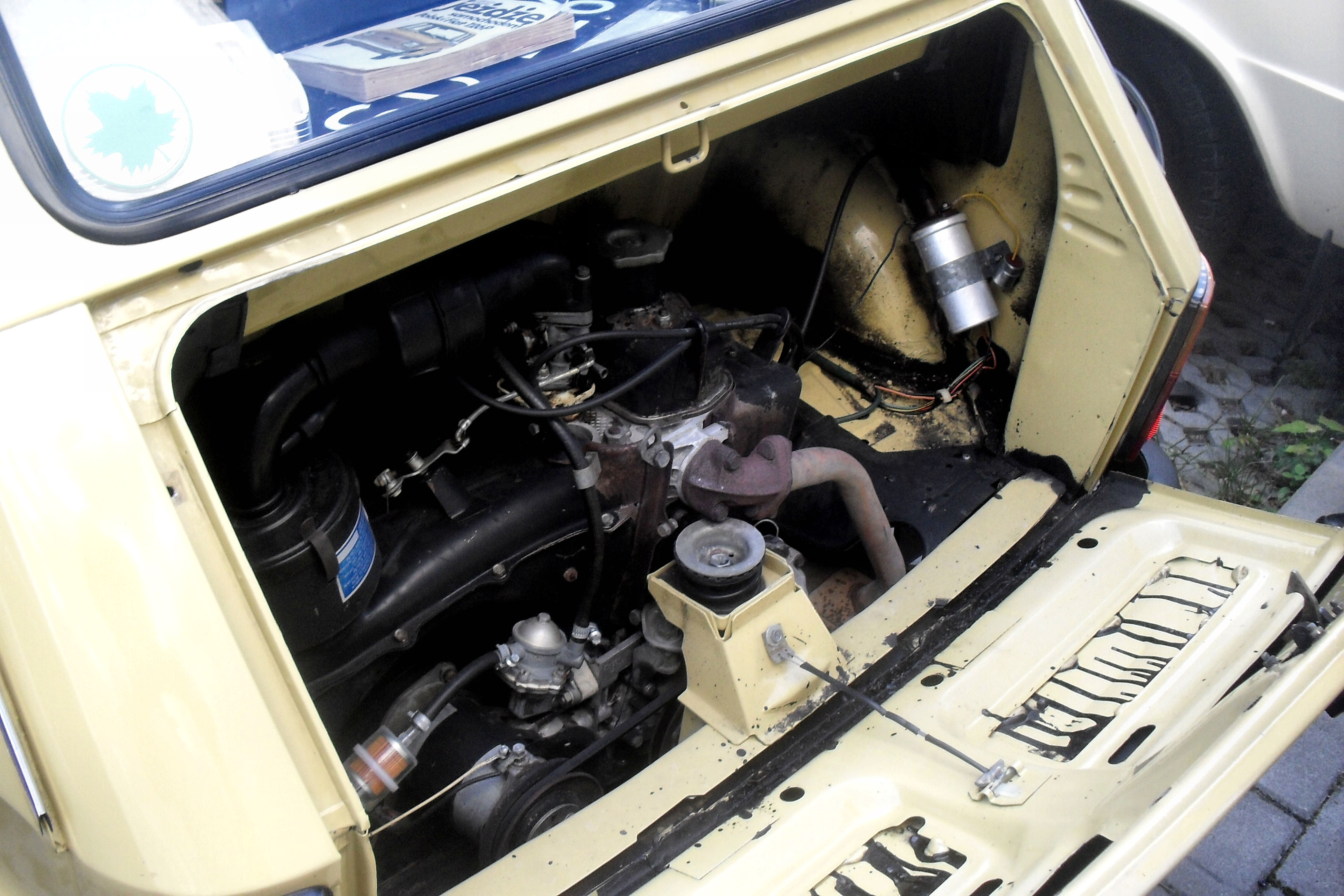 Komora silnikowa Polskiego Fiata 126p 650E z 1984 roku.